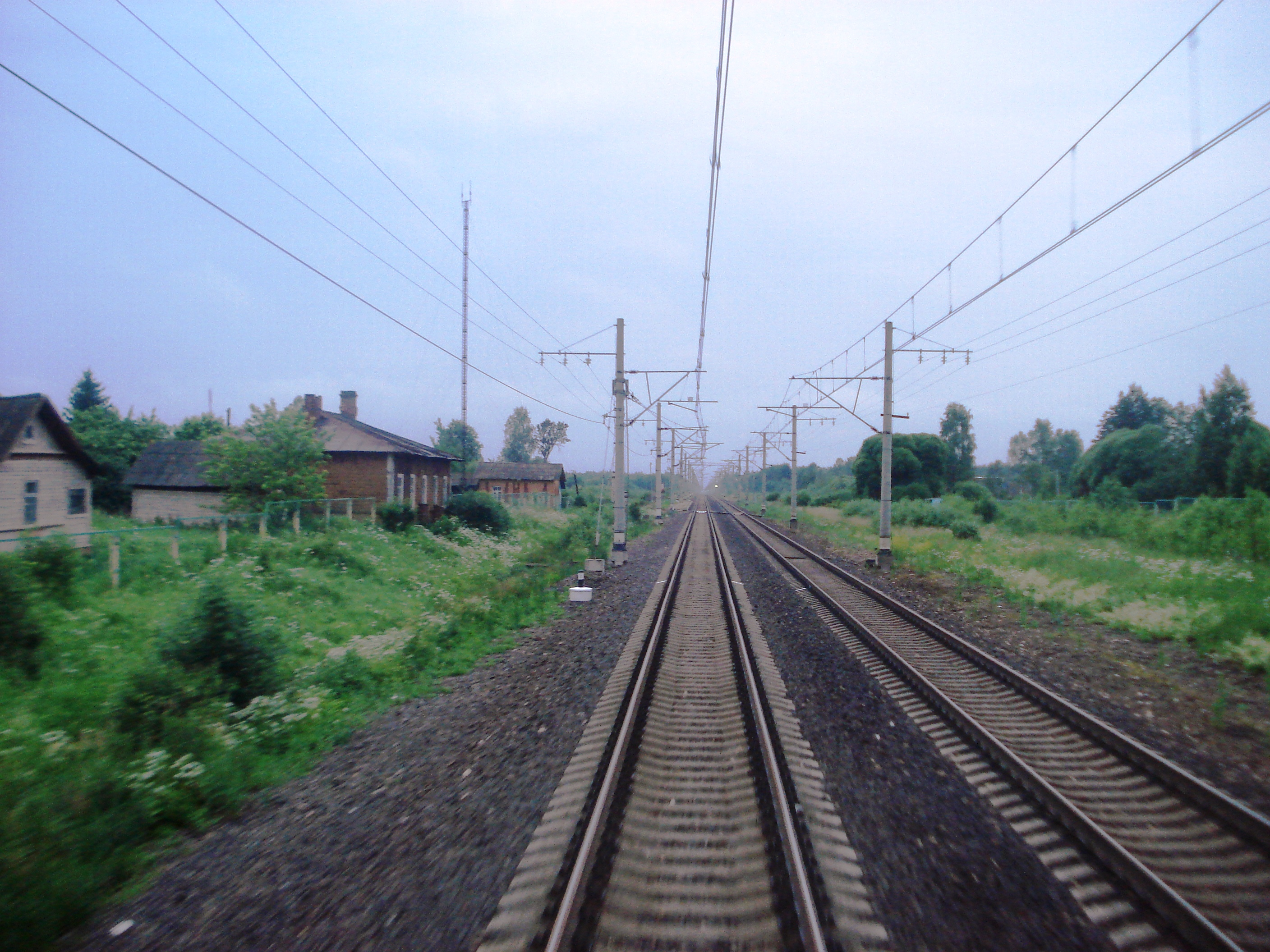 Октябрьская железная дорога около Малой Вишеры